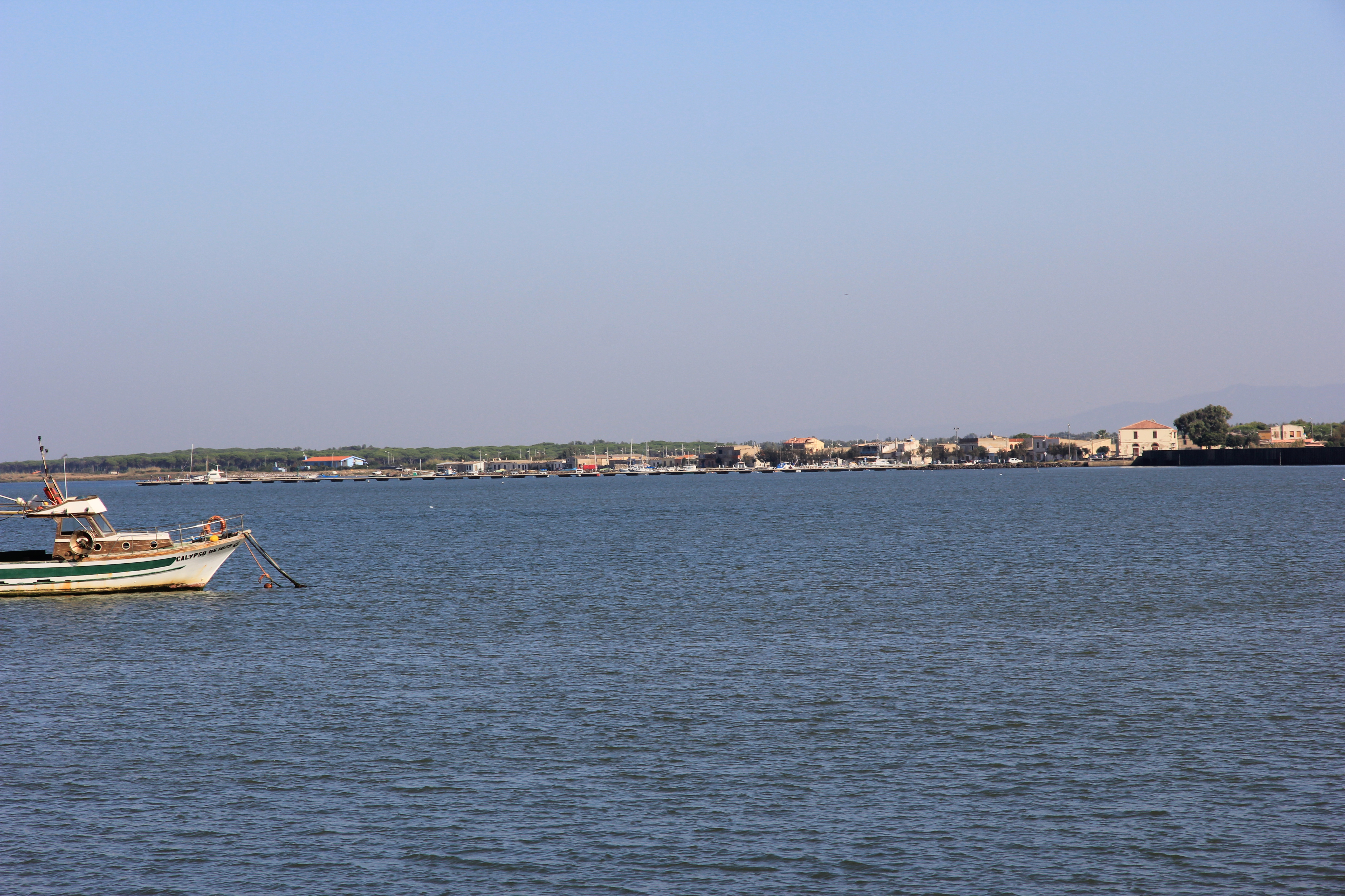 Marceddì